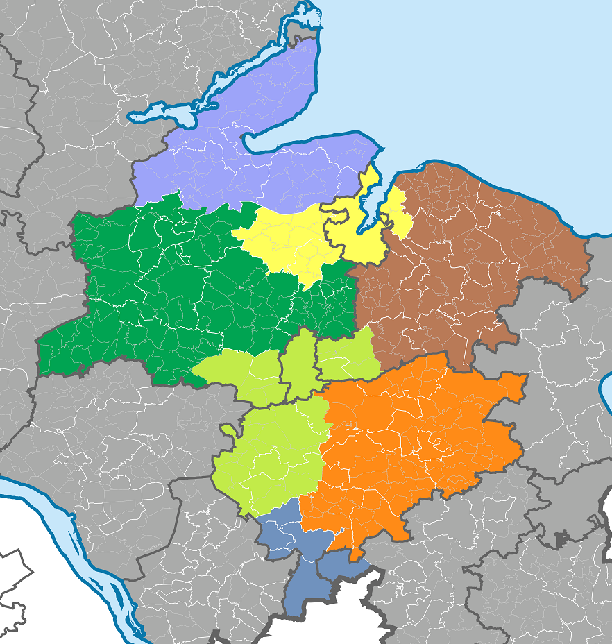 Karte der Amtsgerichtsbezirke im Landgerichtsbezirk Kiel Amtsgericht Eckernförde Amtsgericht Rendsburg Amtsgericht Kiel Amtsgericht Plön Amtsgericht Neumünster Amtsgericht Bad Segeberg Amtsgericht Norderstedt